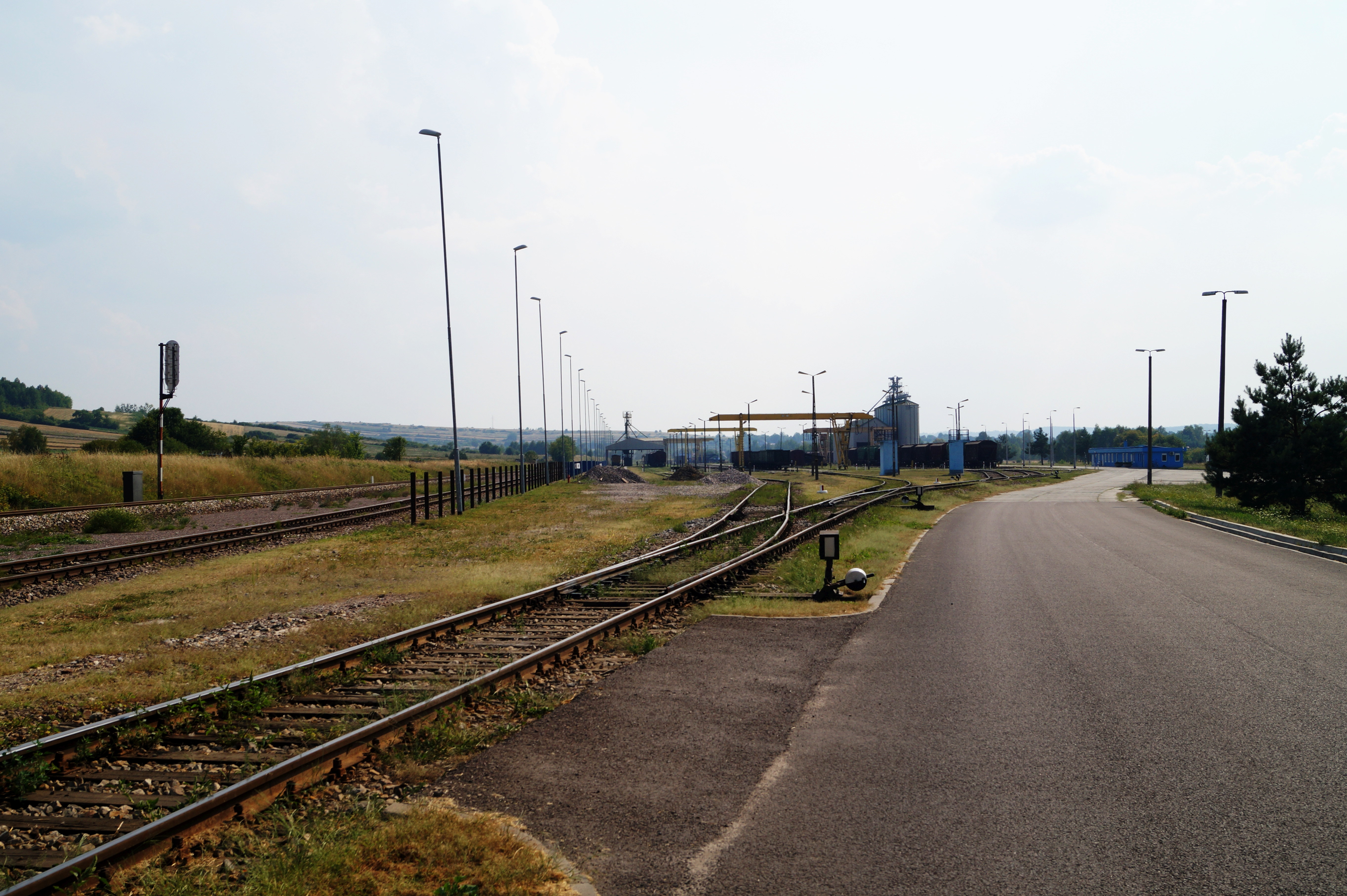 Widok ogólny na tory przeładunkowe stacji Szczebrzeszyn LHS